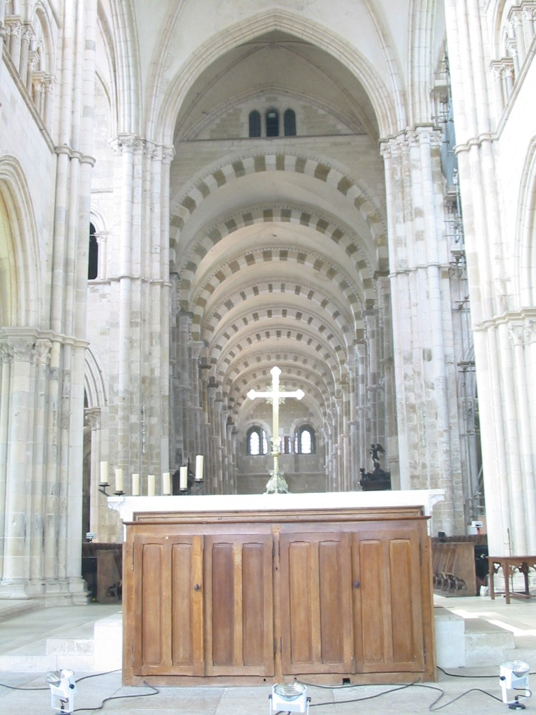 Vézelay. Photo de la nef de la la basilique Sainte-Marie-Madeleine